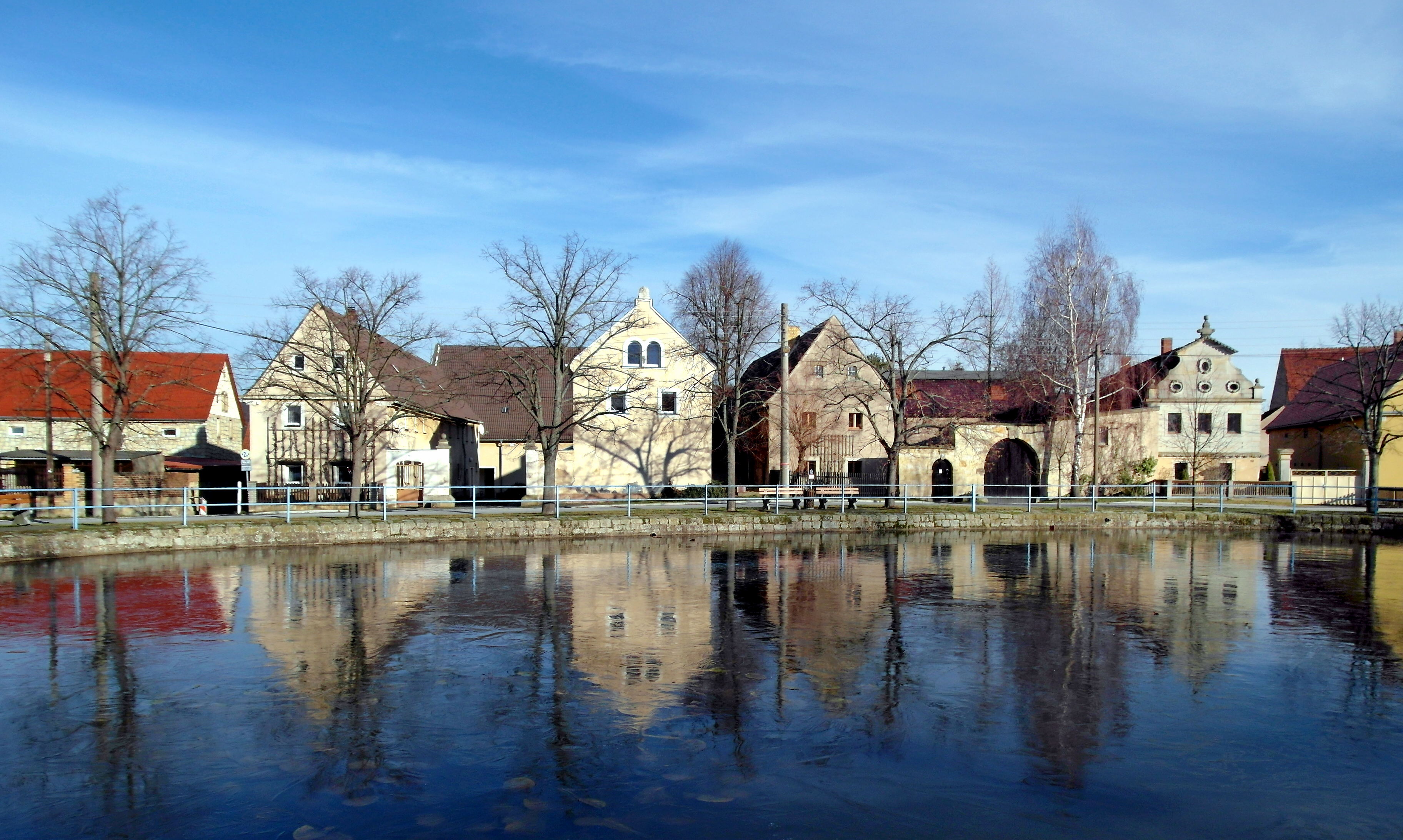 19.01.2019 01796 Goes (Dohma): Dorfanger Goes in Form eines Rundlings mit dem Dorfteich (GMP: 50.928305,13.945817). Blick nach Nordosten zu den historischen Giebelhäusern der Gehöfte an der Dorfstraße. [SAM8975.JPG]20190119205DR.JPG(c)Blobelt